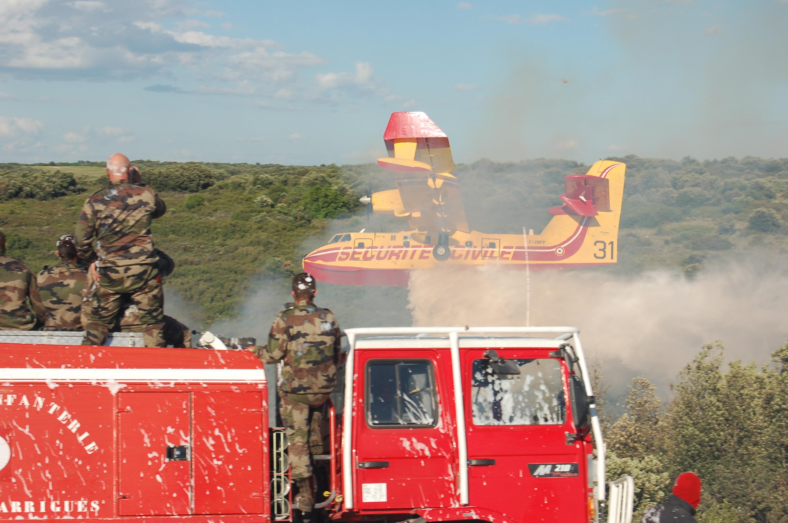 Je suis en surveillance de suivi ornithologique. Un feu se déclare en fin de journée sur le camp des Garrigues, ce 29 mai 2006 . A 400 mètres se trouvent les premières villas civiles. Zone Cros de Bègues commune de POULX Le vent est orienté Ouest . Les Canadairs interviennent sur le camp. Le larguage s'effectue dans une combe orientée Sud Nord. Le bombardier d'eau se trouve à 25 mètres du sol. Nous sommes à 80 mètres mètres de l'appareil. Devant moi, un camion de pompiers du camp et des militaires. Cette photo comporte une signature confondue dans l'environnement . Elle fait partie d'une collection concernant les feux de forêt et la défense de l'environnement créée par JOYON Gérard